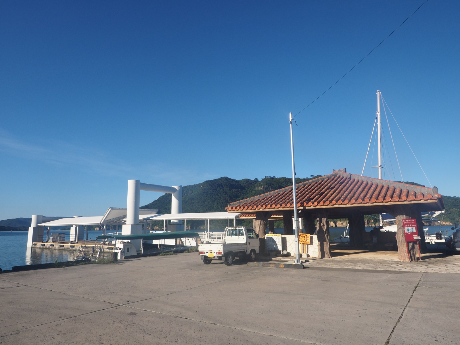 白浜港浮桟橋（沖縄県八重山郡竹富町西表島）